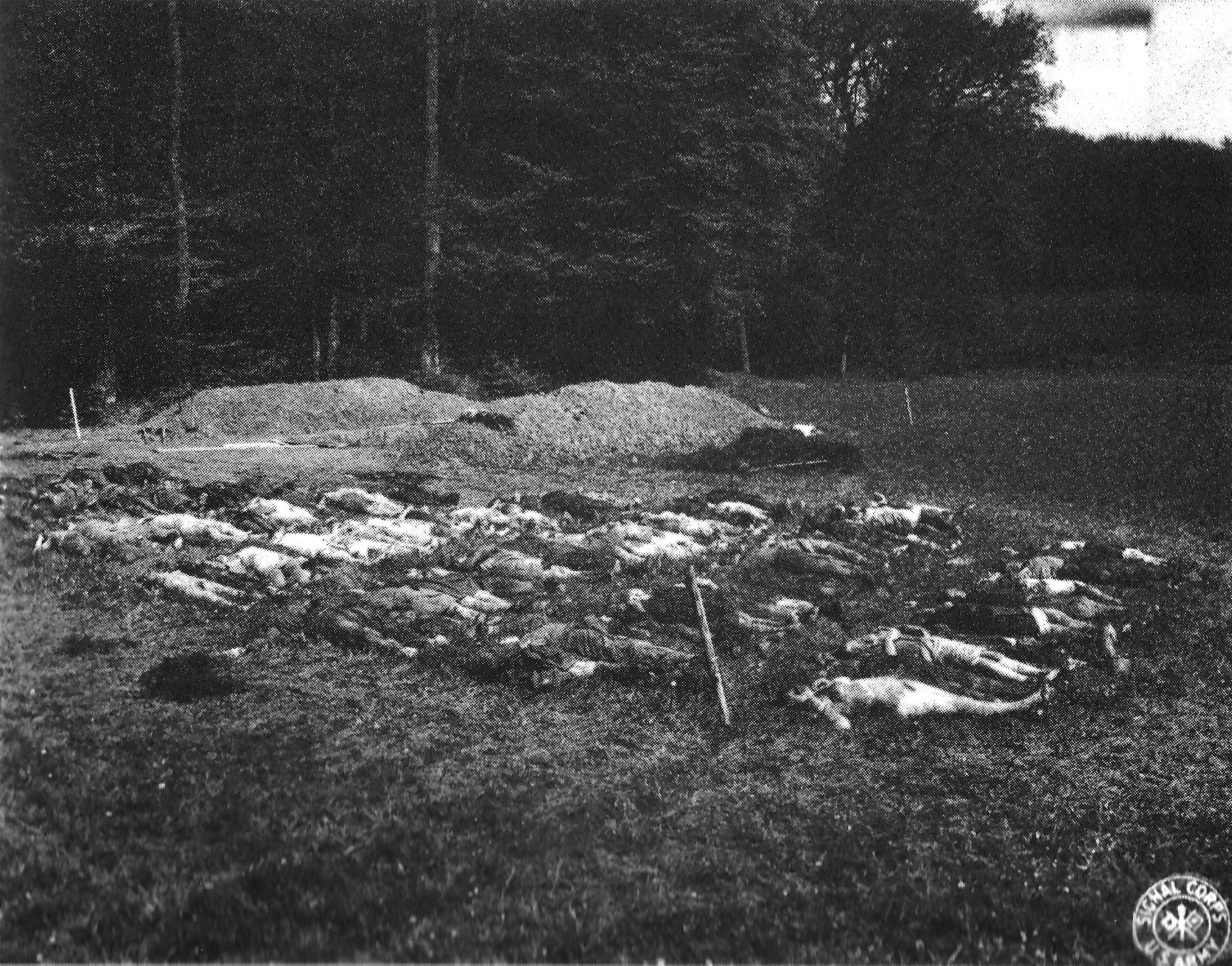 Geöffnetes Massengrab beim Arbeitserziehungslager Hirzenhain.